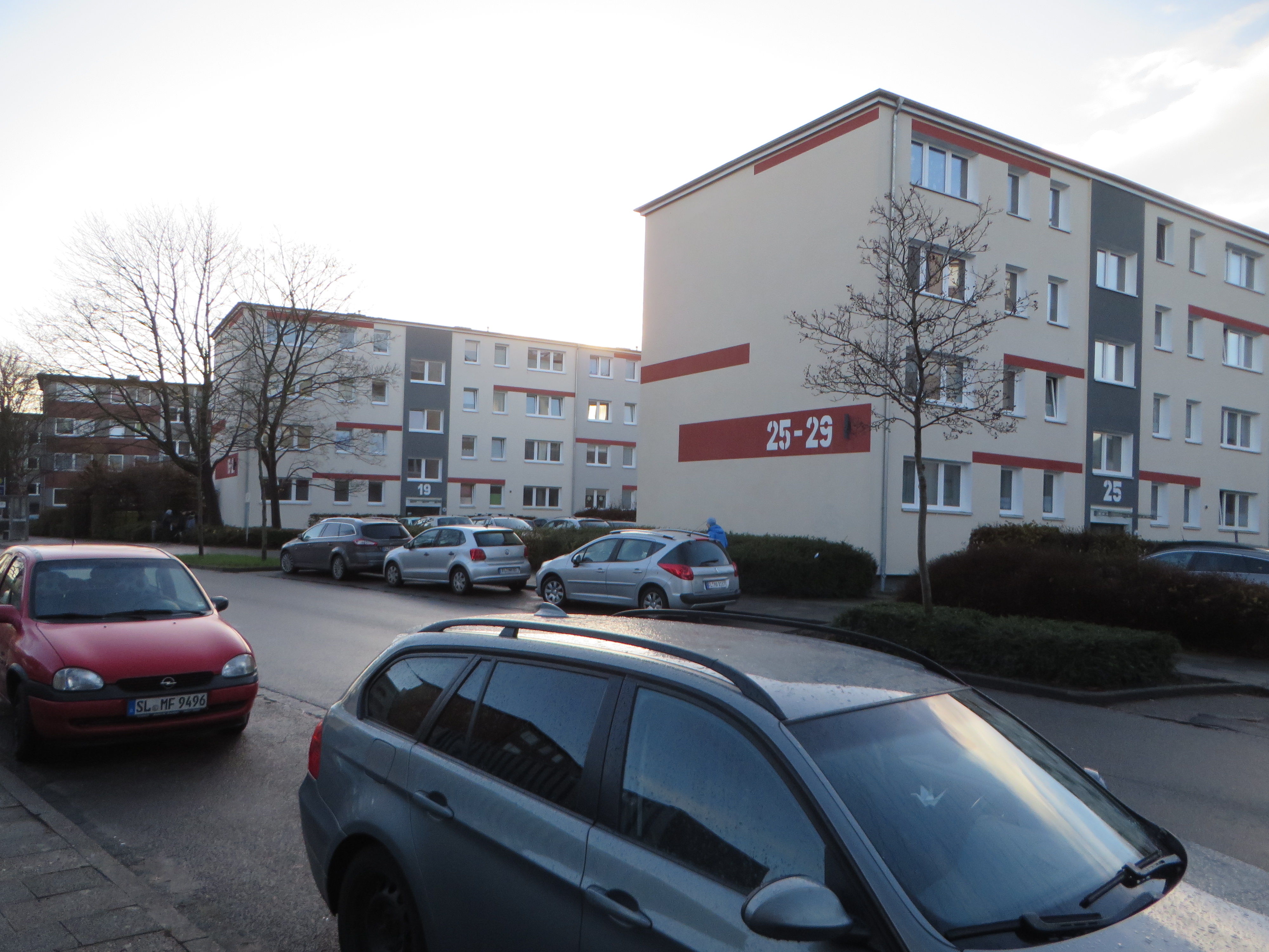 Zeilenbauten Mozartstraße 13-7, 19-23, 25-29 (Flensburg-Engelsby-Musikerviertel November 2017)